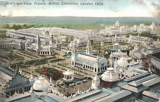 Im Rahmen der parallel zu den IV. Olympischen Sommerspielen 1908 veranstalteten internationalen Messe (Franco-British Exhibition) in London veröffentlichte Ansichtskarte